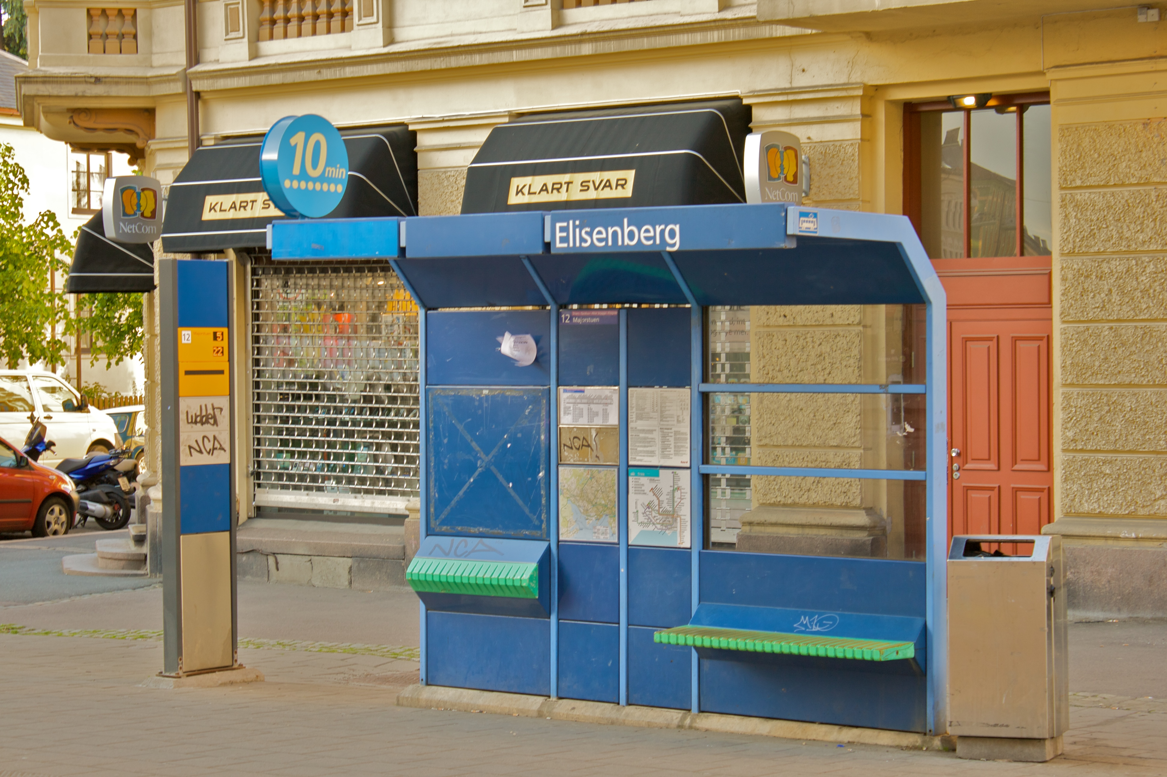 Trikkestoppet på Elisenberg i Frognerveien.